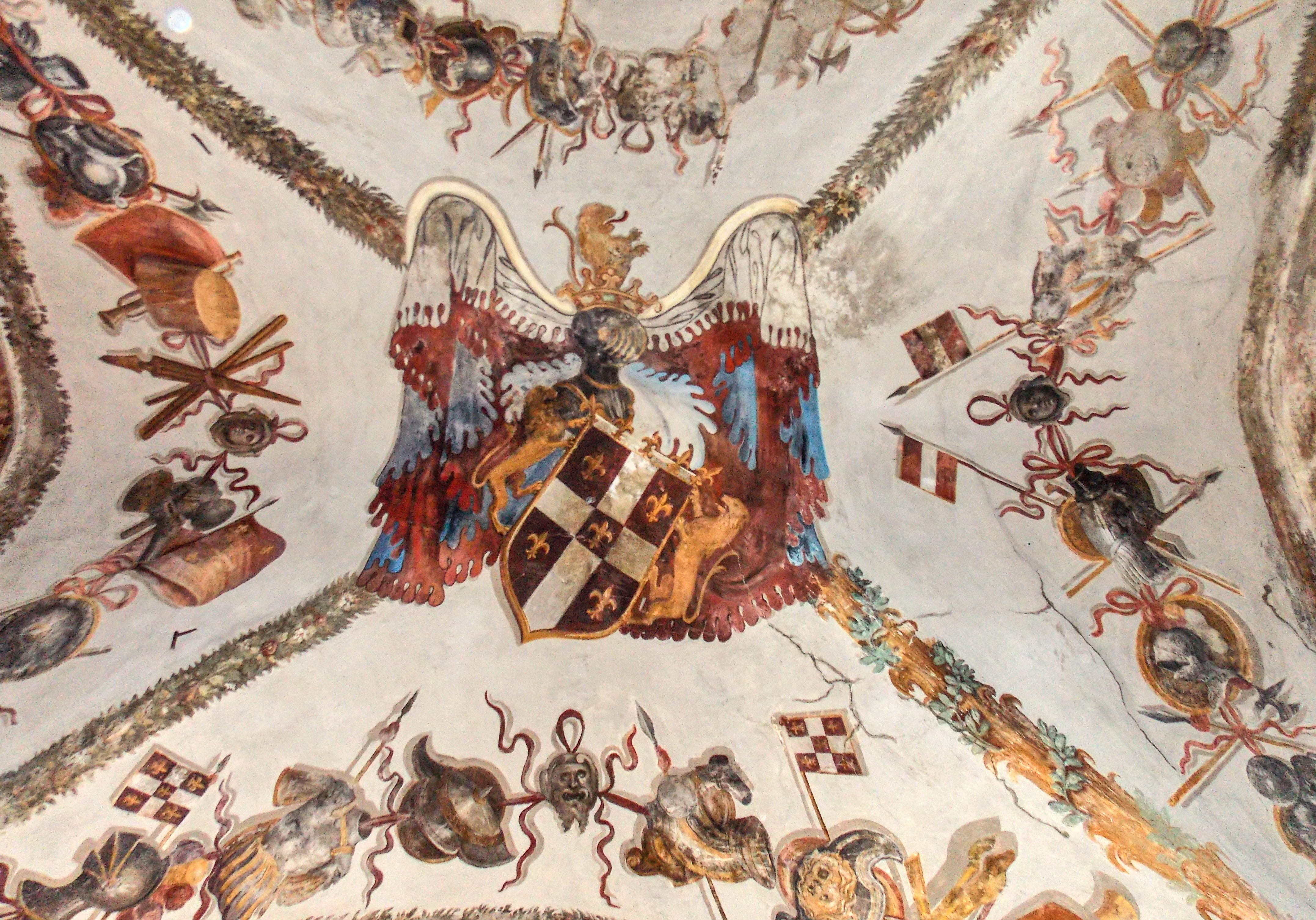 Castello Pignatelli della Leonessa a San Martino Valle Caudina (AV).